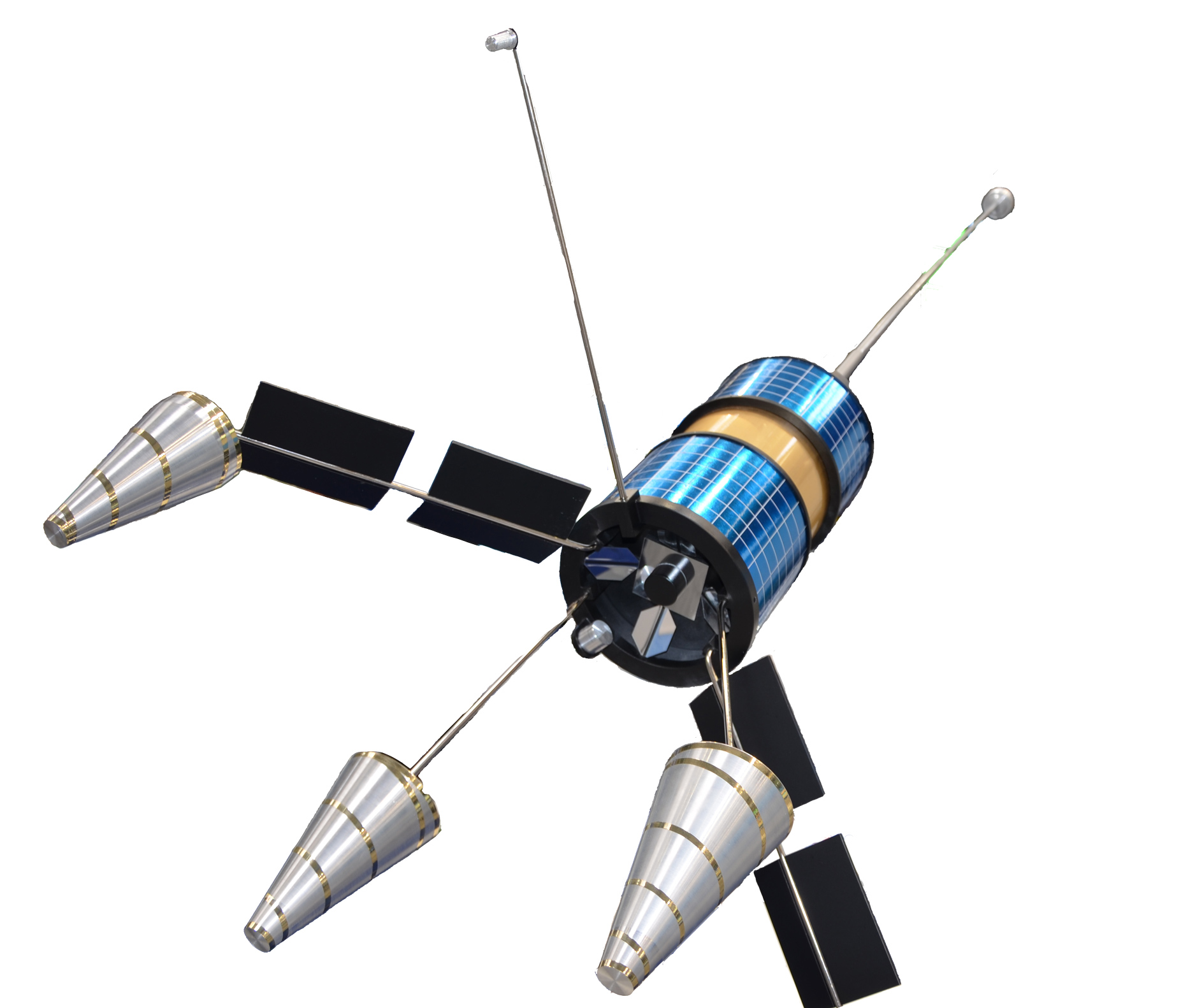 Maquette de satellite Gonets-M